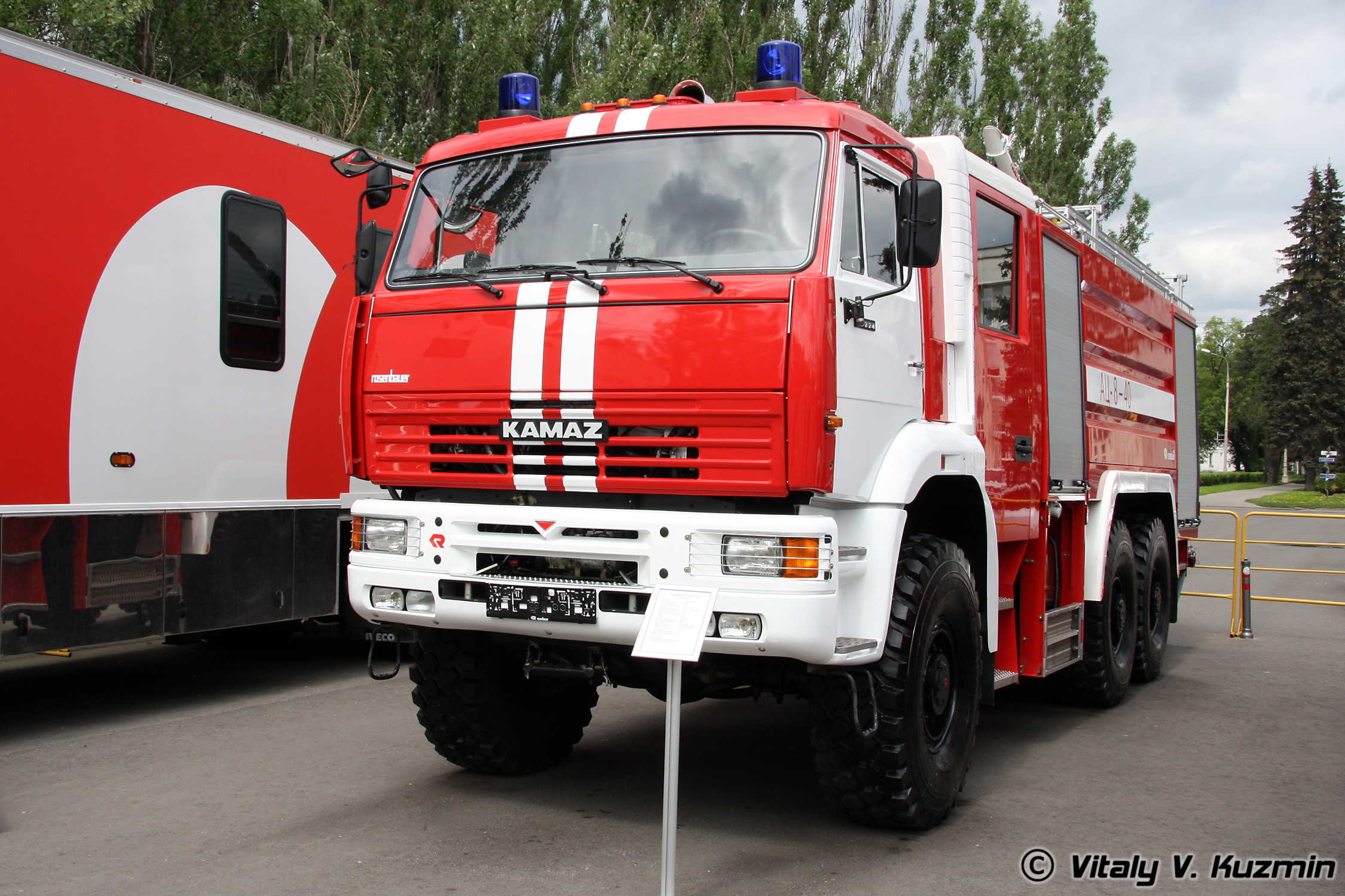 Пожарная автоцистерна АЦ 8-40 на шасси КАМАЗ-65224 (ATs 8-40 fire truck on KAMAZ-65224 chassis)